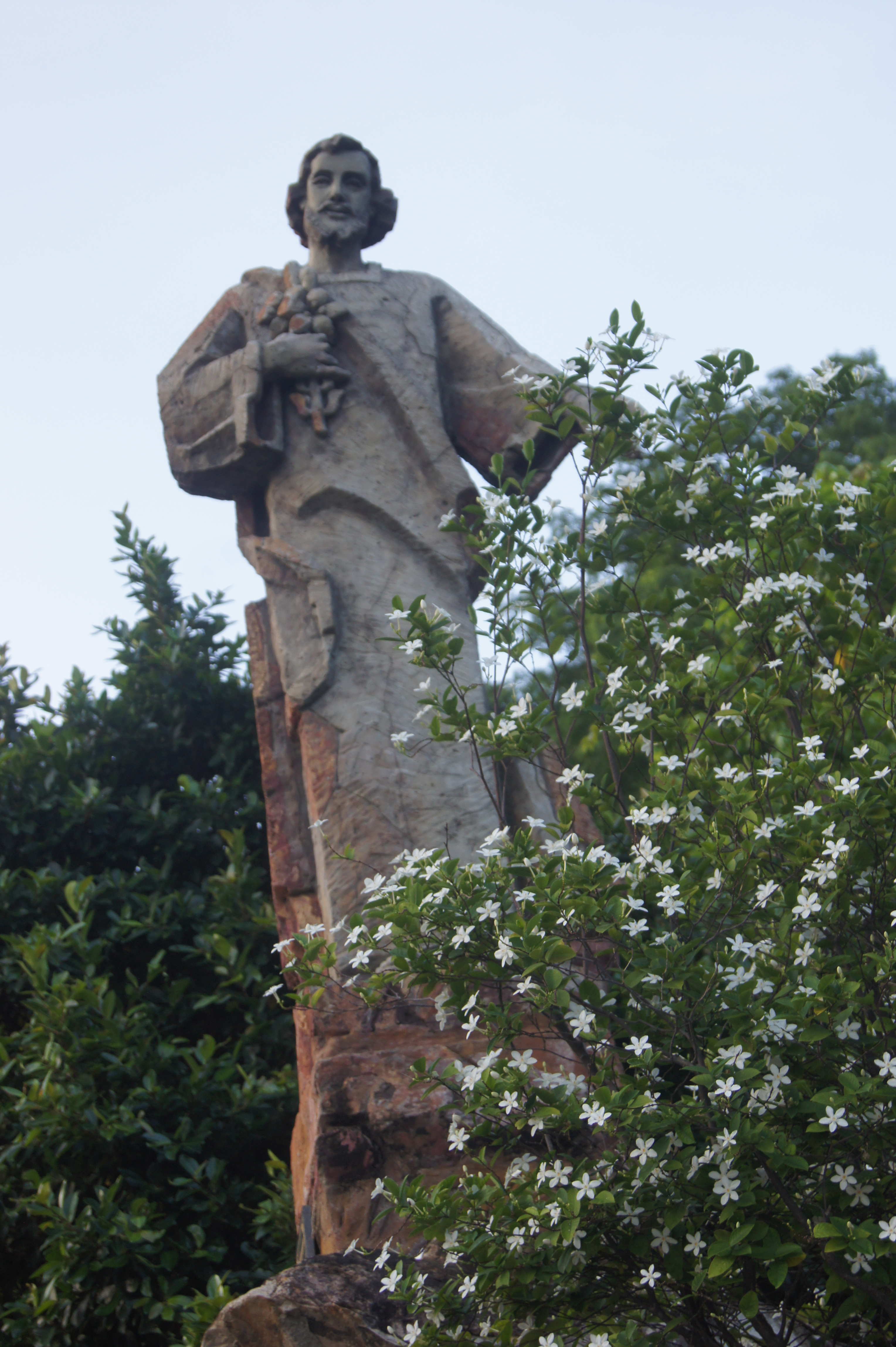 Tượng thánh Giuse tại Đền thánh Đức Mẹ Bãi Dâu, Vũng Tàu, Việt Nam.